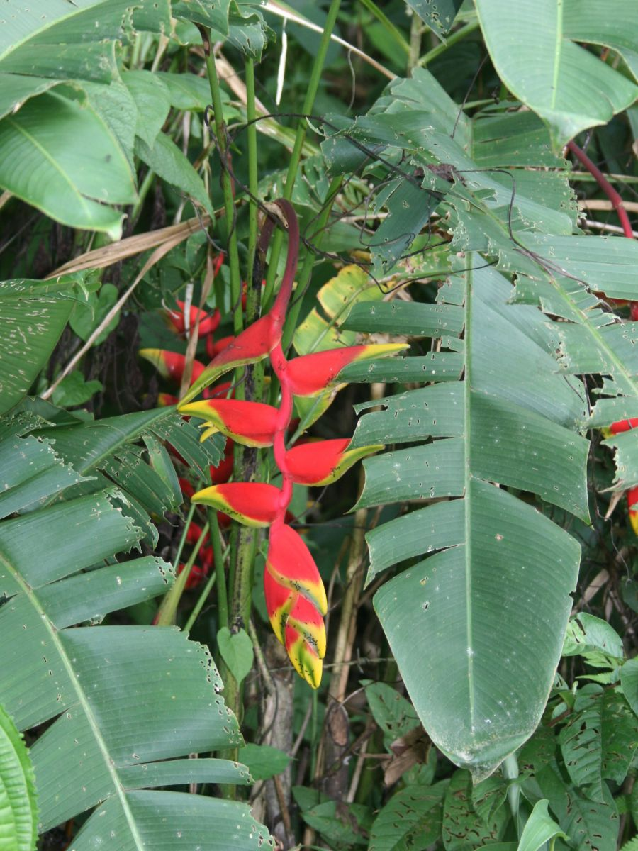 Heliconia rostrata, Heliconiaceae - Costa Rica: Prov. Puntarenas, La Gamba NW Golfito, "Tropenstation La Gamba"/"Estación Biológica La Gamba"